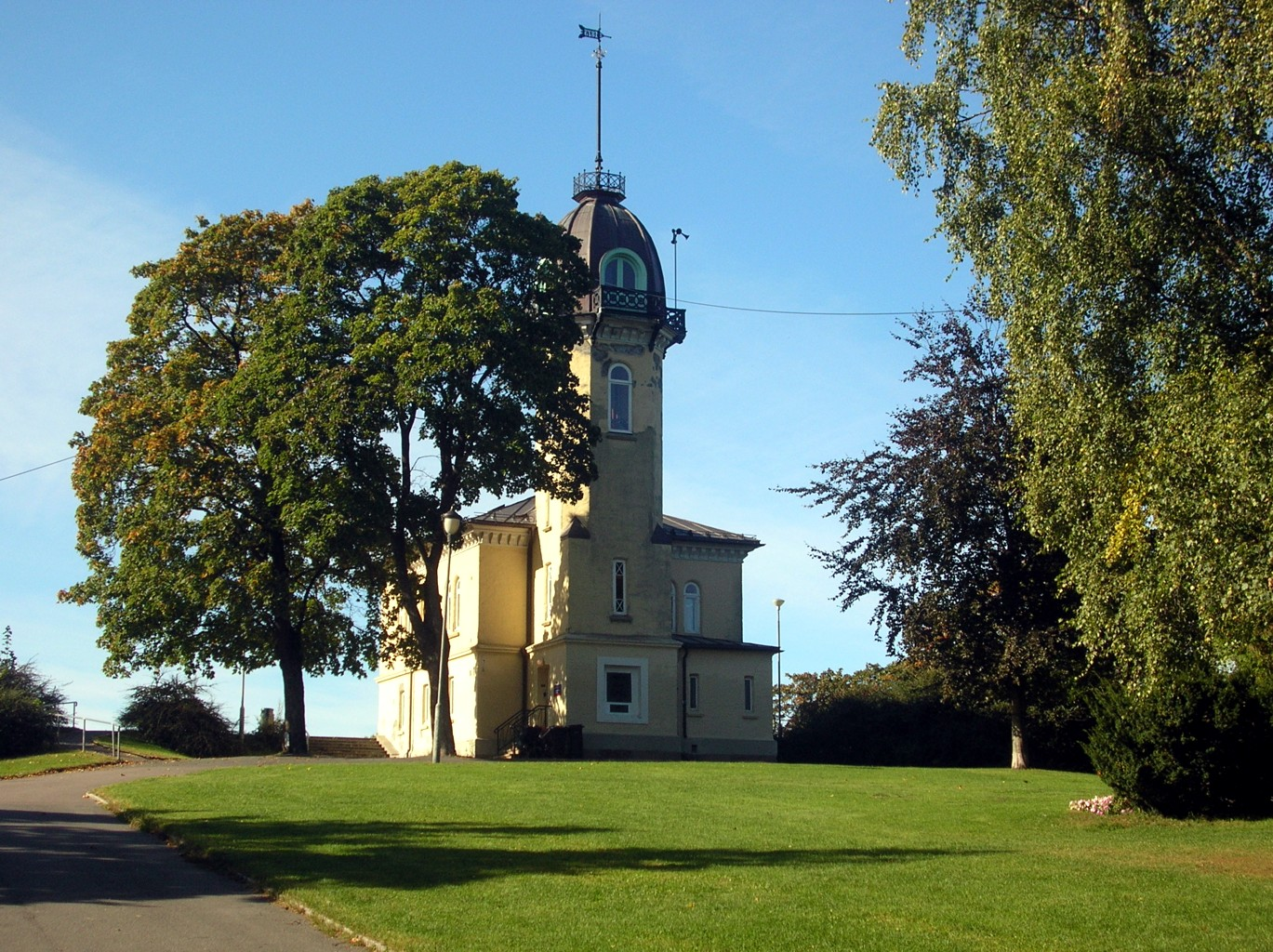 St. Hanshaugen – park w Oslo (Norwegia)